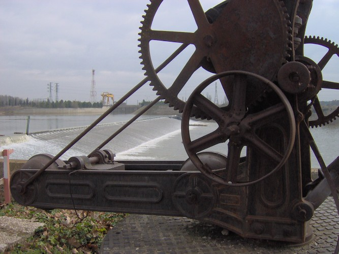 Obsérvese la grua antigua, herrumbrosa en primer plano, el azud de Pignatelli en el Ebro, de donde parte el Canal Imperial de Aragón, y el moderno puente grua al fondo.